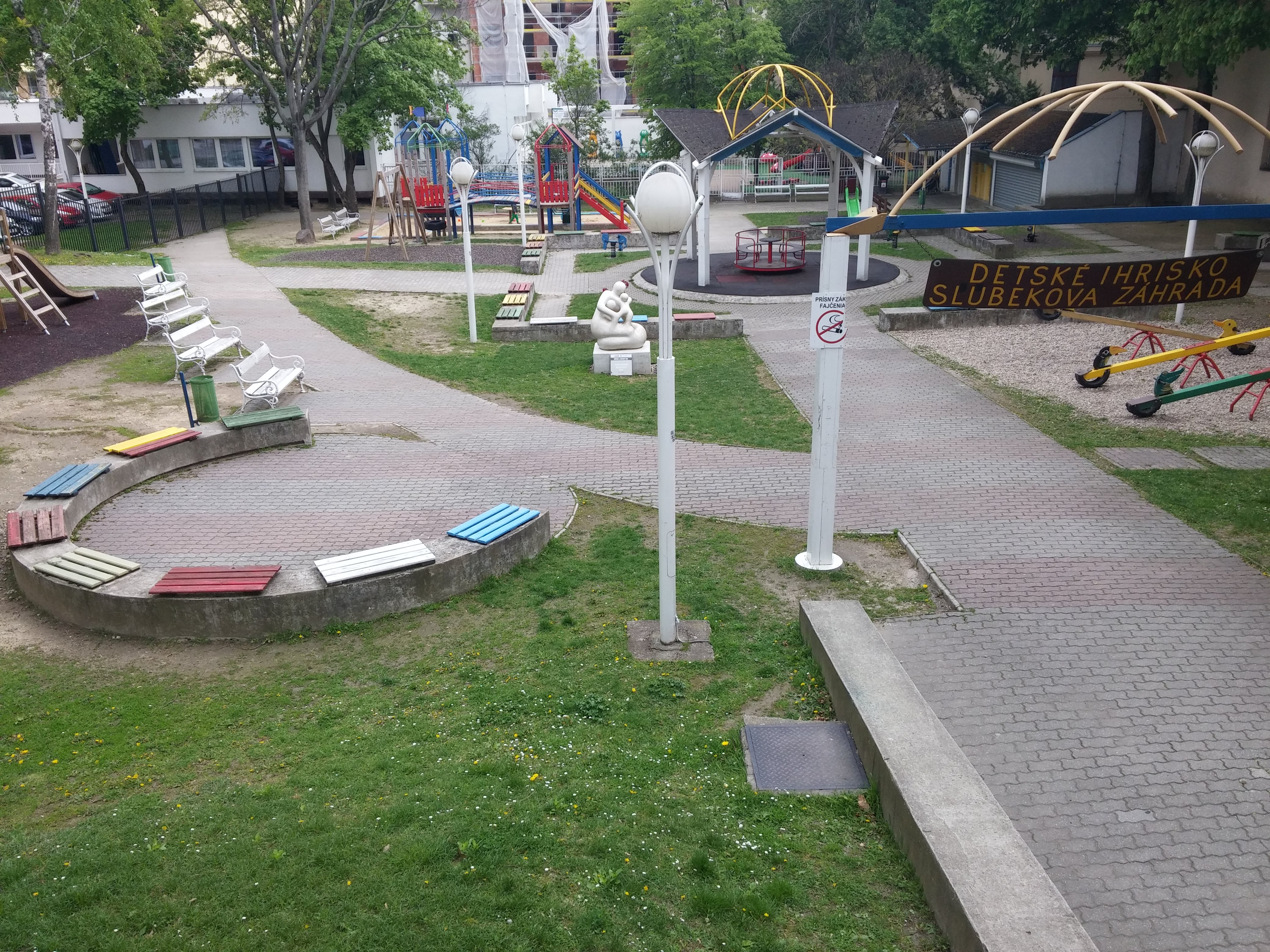 Slubekova záhrada, Staré Mesto, Bratislava